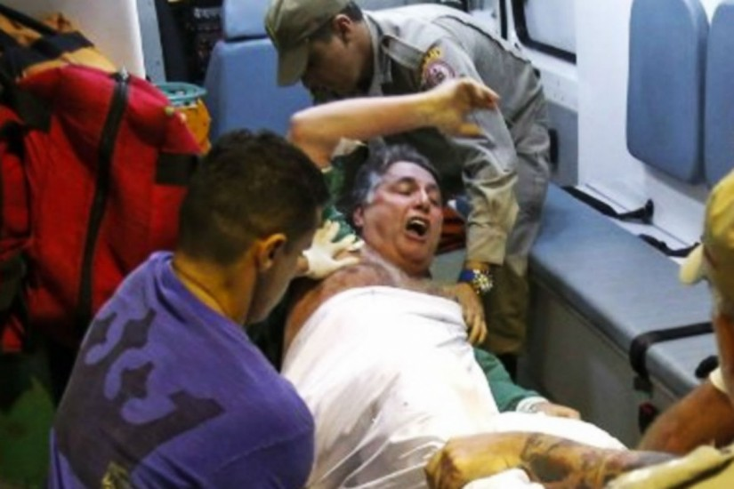 sendo transferido para o presidio